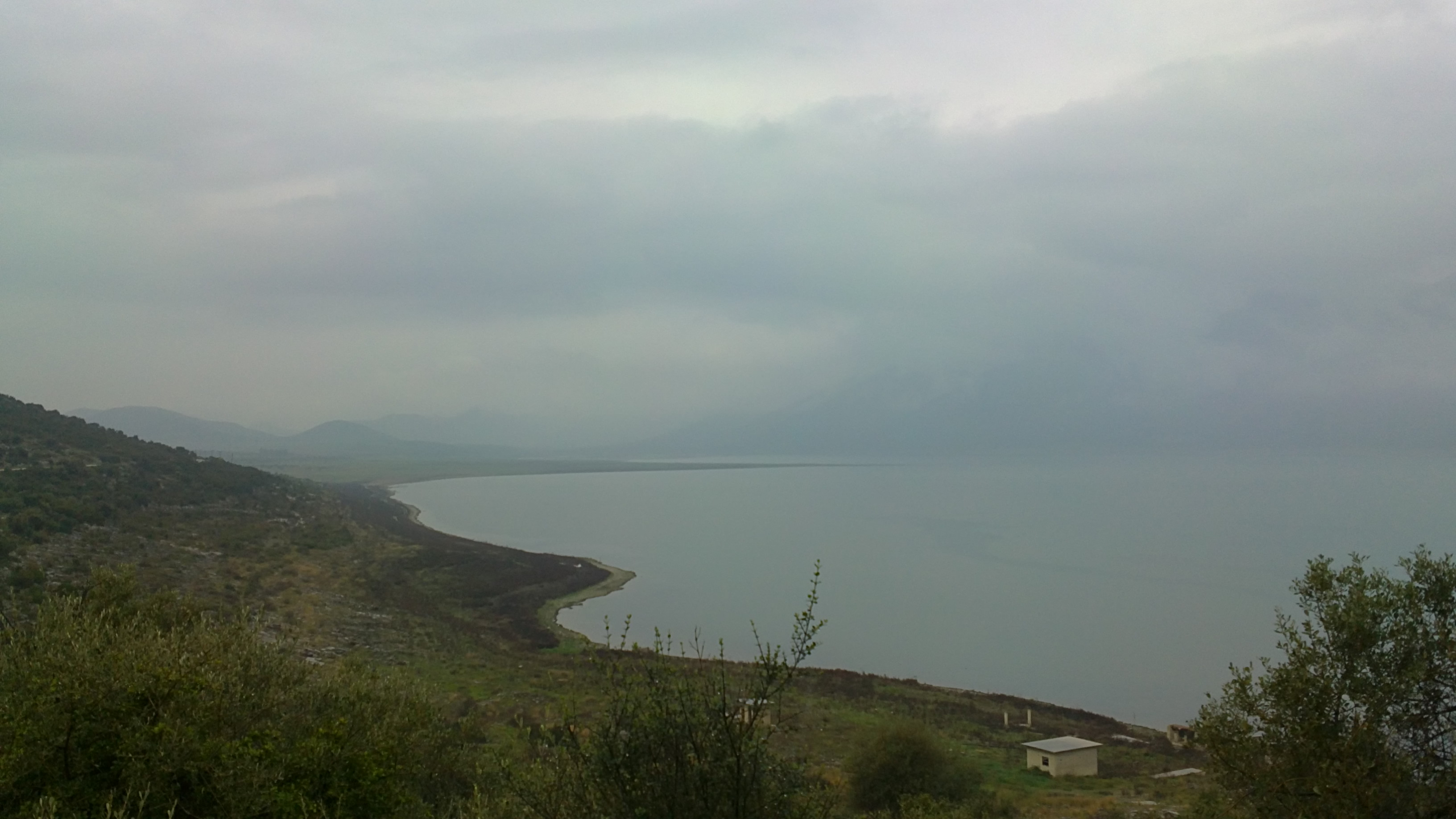 Στο βάθος η Παραλίμνη από την μεριά της Βοιωτίας.